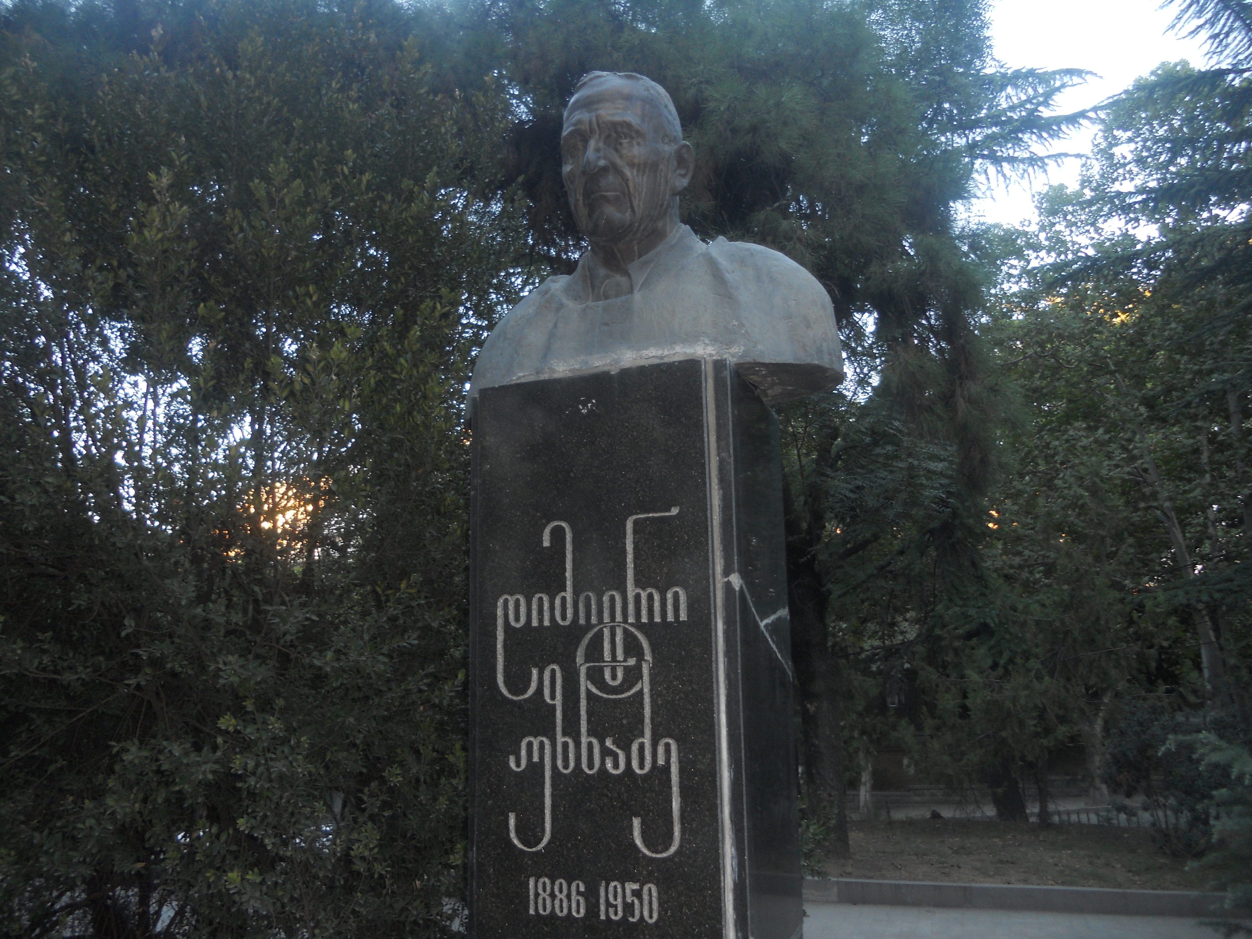 სახელმწიფო უნივერსიტეტის I კორპუსი